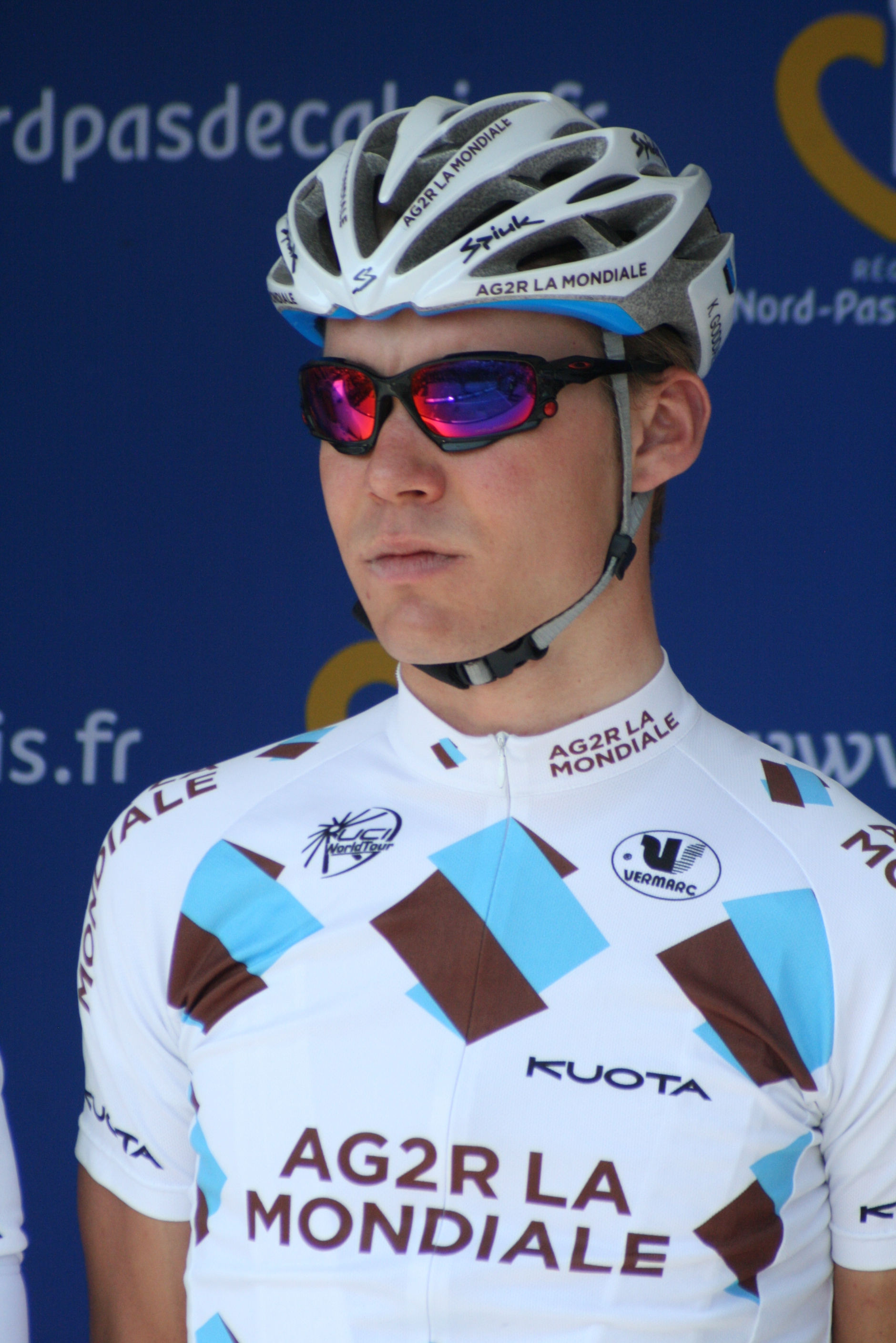 Présentation des coureurs au départ de la première étape Kristof Goddaert